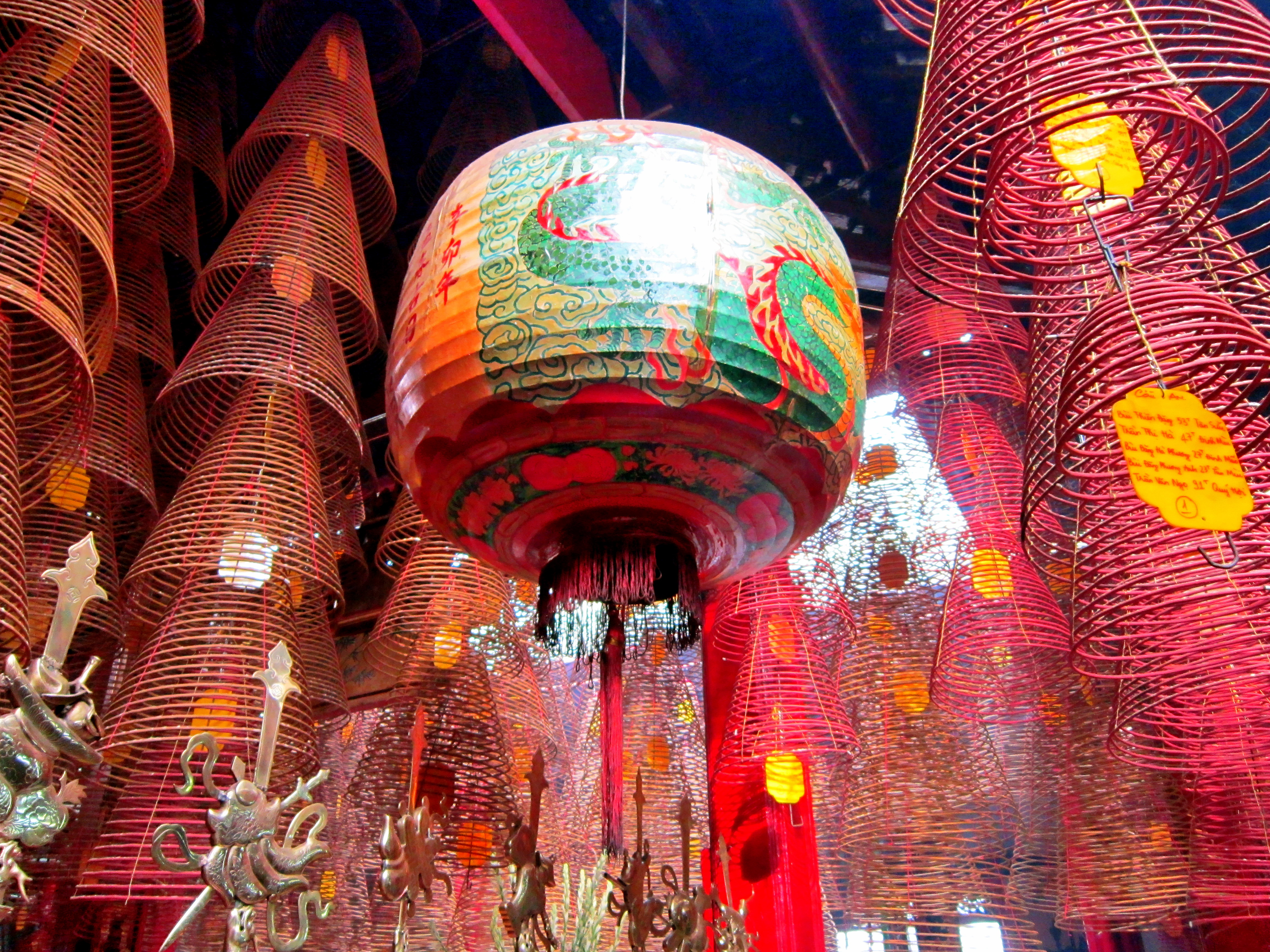 Đèn lồng và hương vòng ở bên trong Chùa Ông; tọa lạc tại số 32 đường Hai Bà Trưng, thuộc phường Tân An, quận Ninh Kiều, thành phố Cần Thơ, Việt Nam.